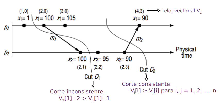 Relojes vectoriales para evaluar cortes consistentes.